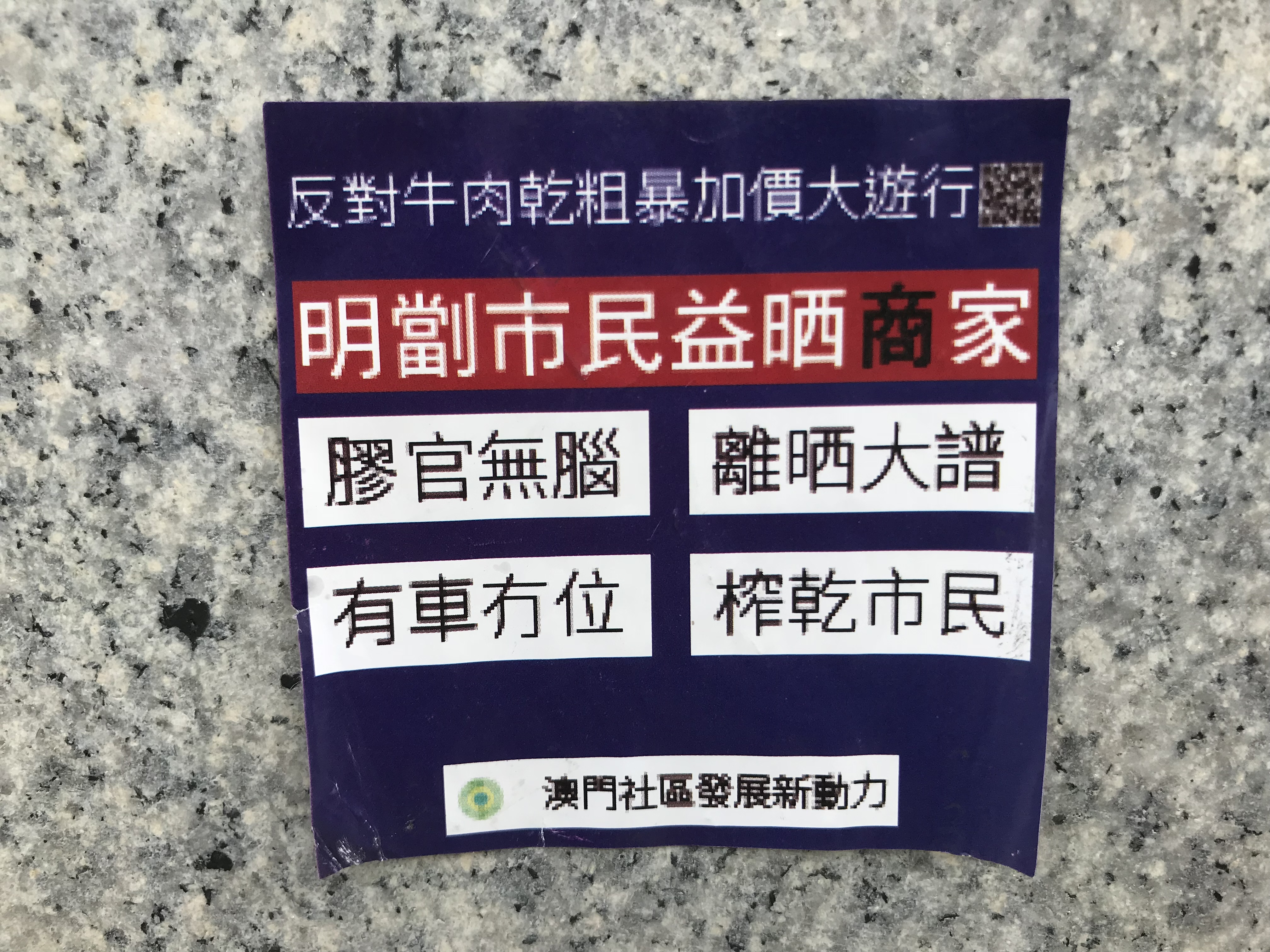 中文（台灣）: 澳門2018年6月16日遊行主辦方提供的貼紙。